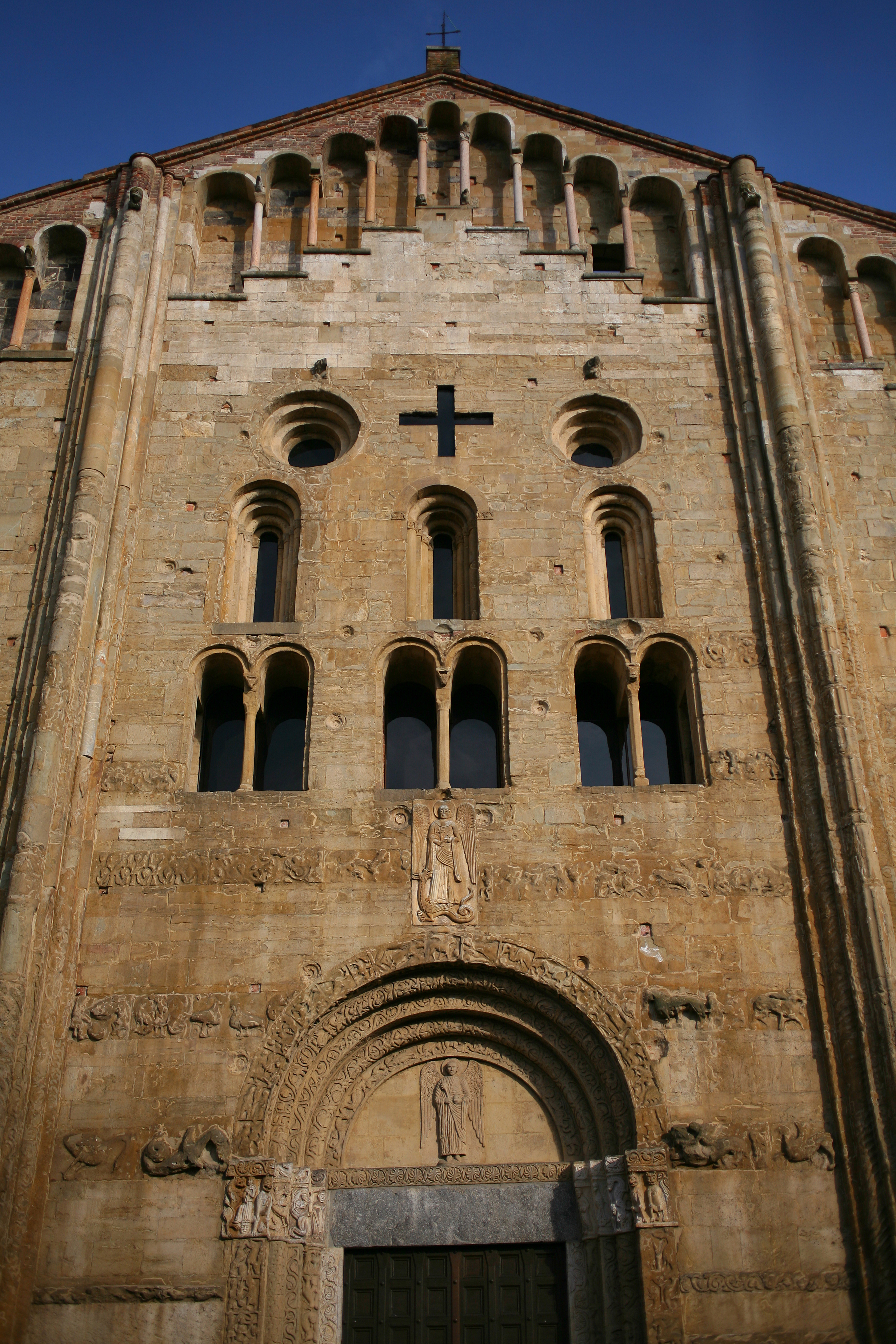 San Michele Maggiore, Pavia, veduta prospettica della facciata